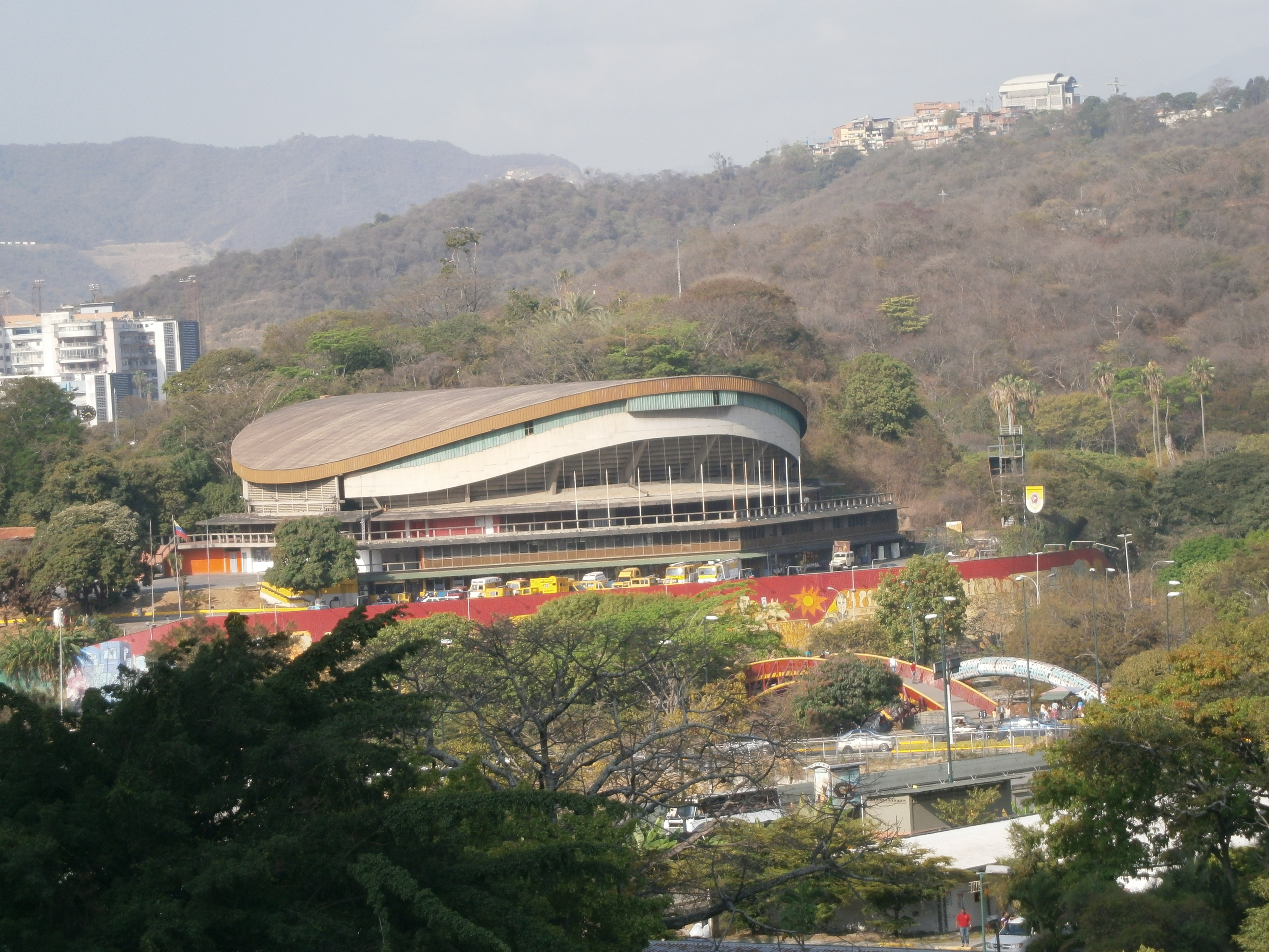 Vista Aerea de Caracas, Venezuela